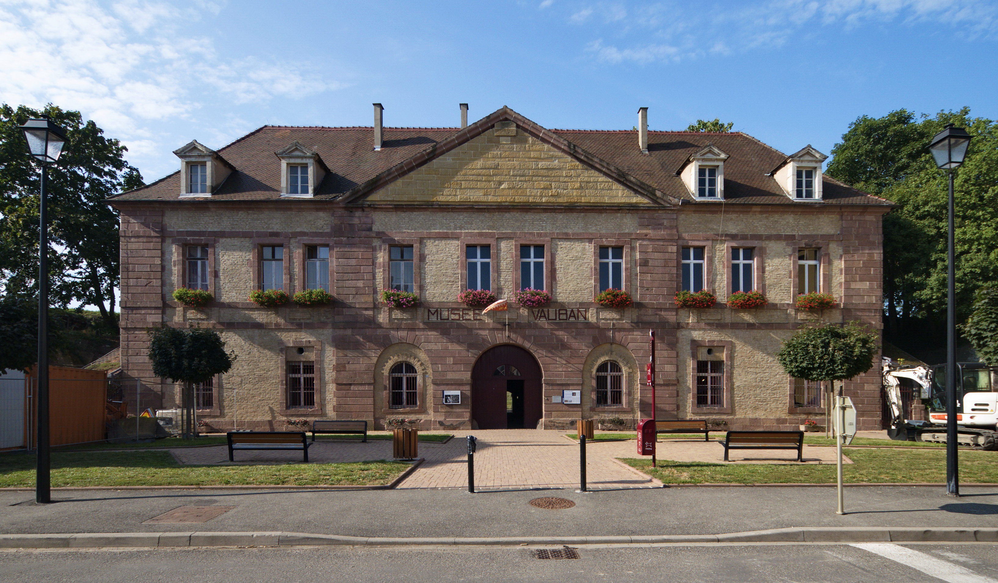 Remparts de Neuf-Brisach, (InscritClasséClassé, 193219621963) .